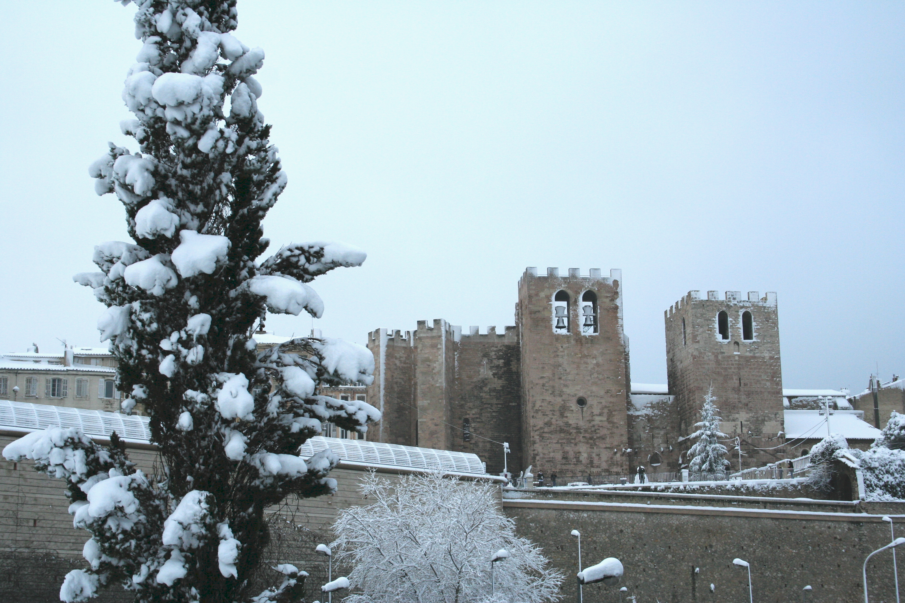 Abbaye de Saint-Victor à Marseille, neie du 7 janvier 2009